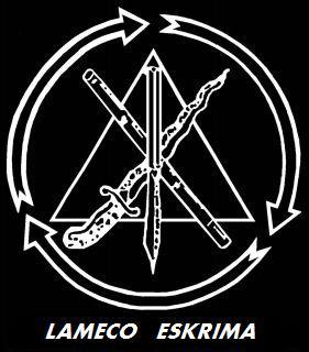 Lameco Sign